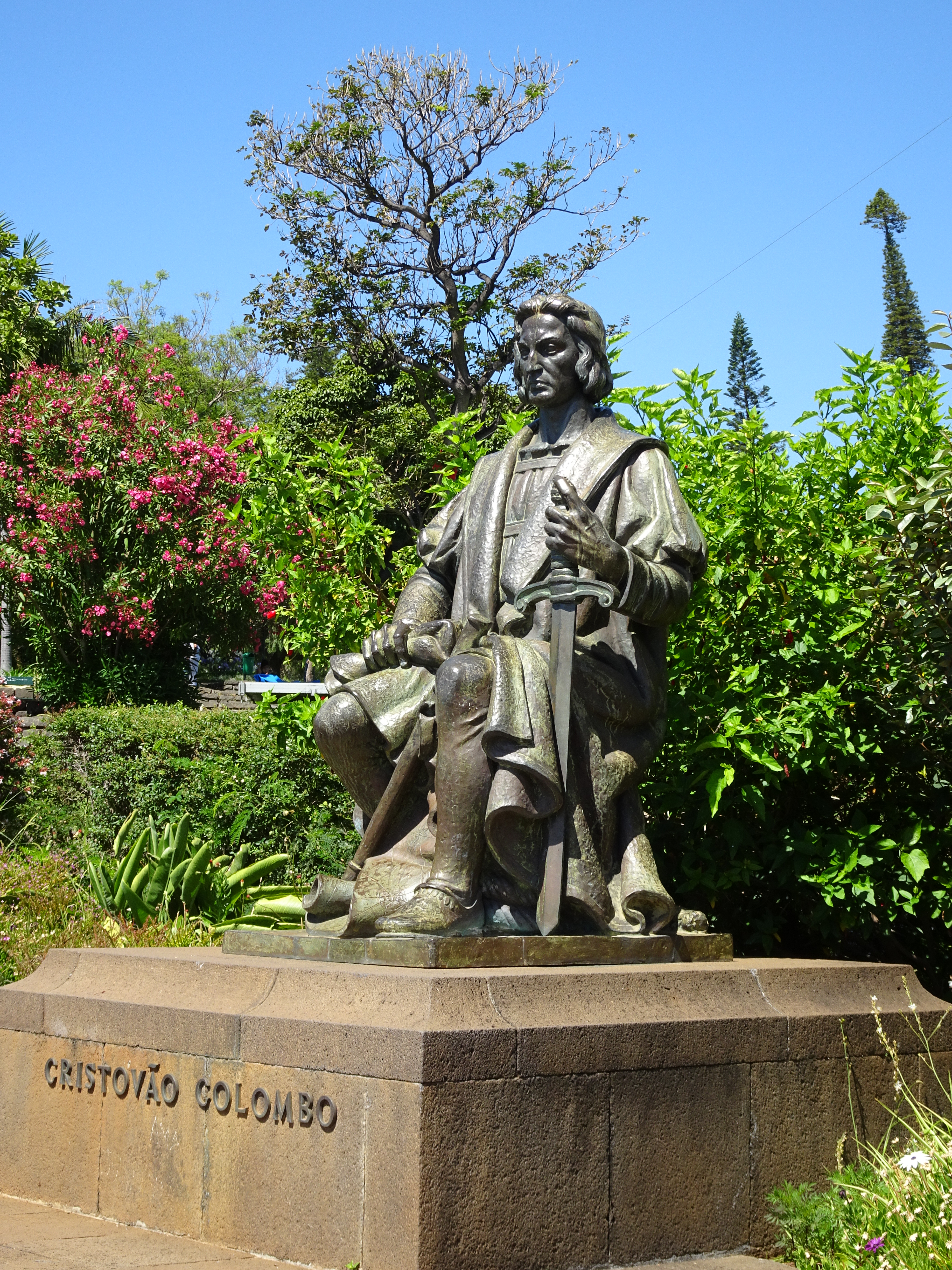 Statue von Christoph Kolumbus in Funchal